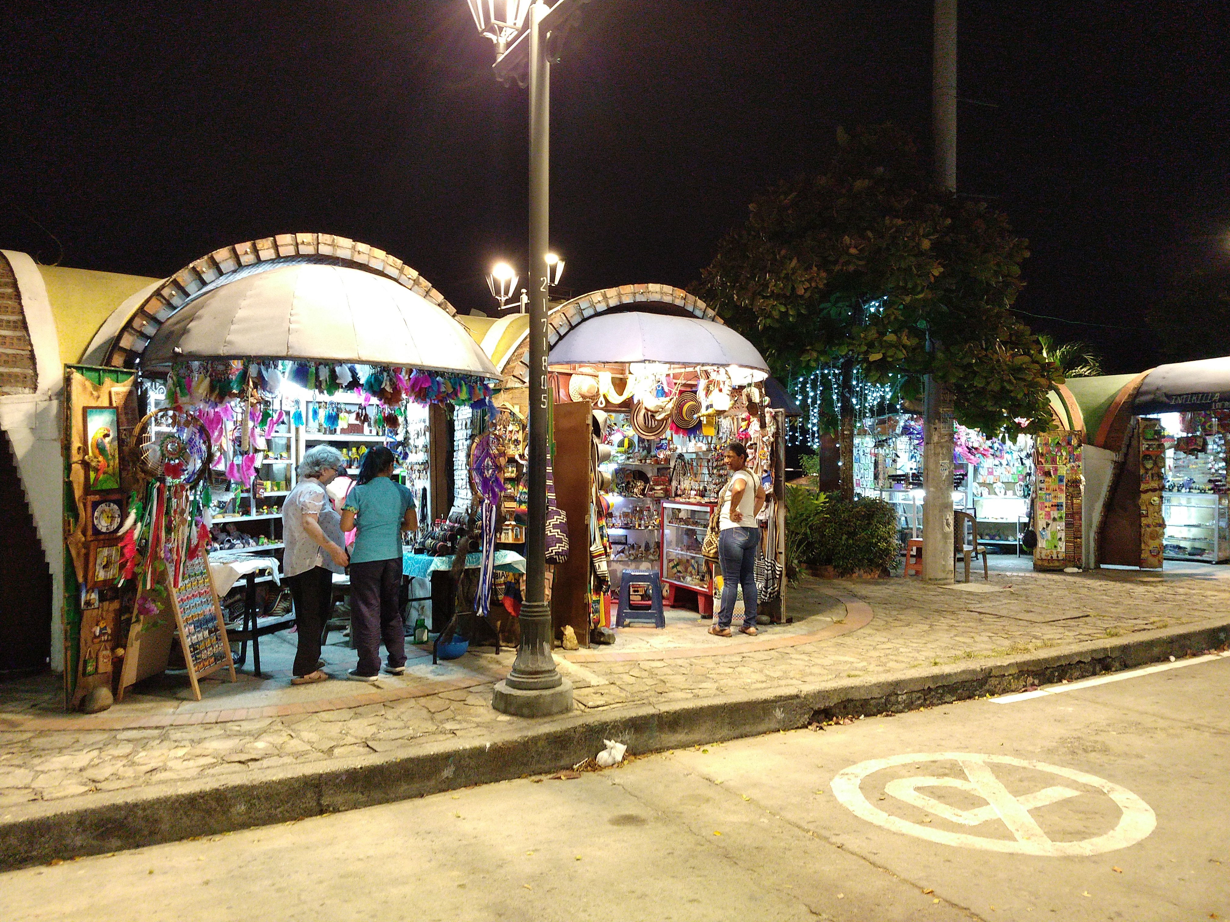 Esta fotografía fue tomada en el municipio colombiano con código 76001.